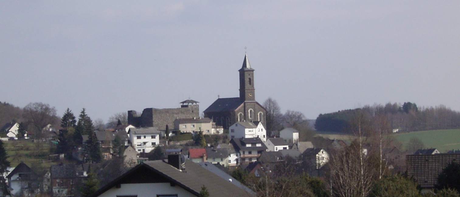 Waldbrunn Ellar - Blick auf Kirche und Burg